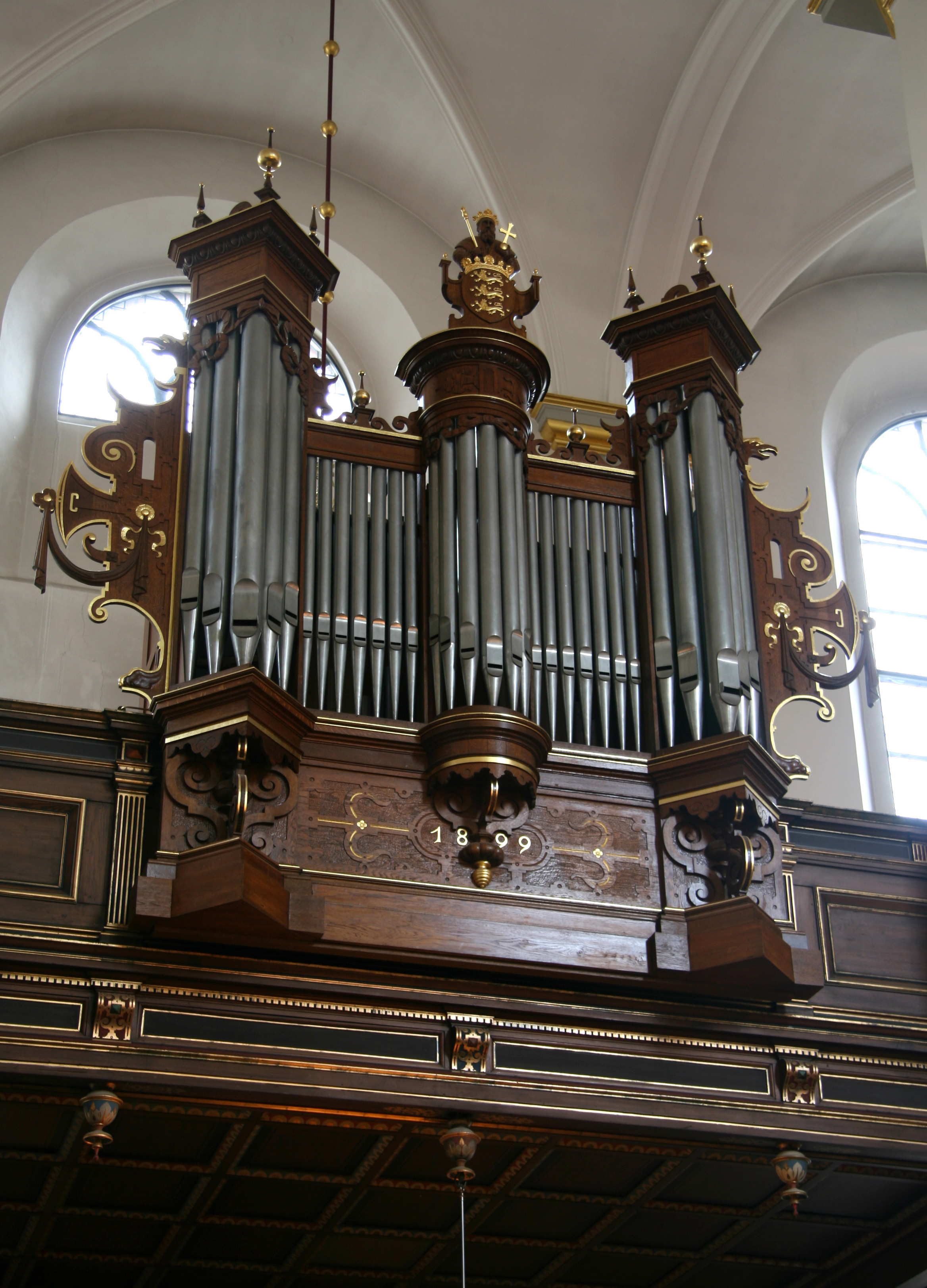 Helligåndskirken, Copenhagen, Denmark. Quire organ.